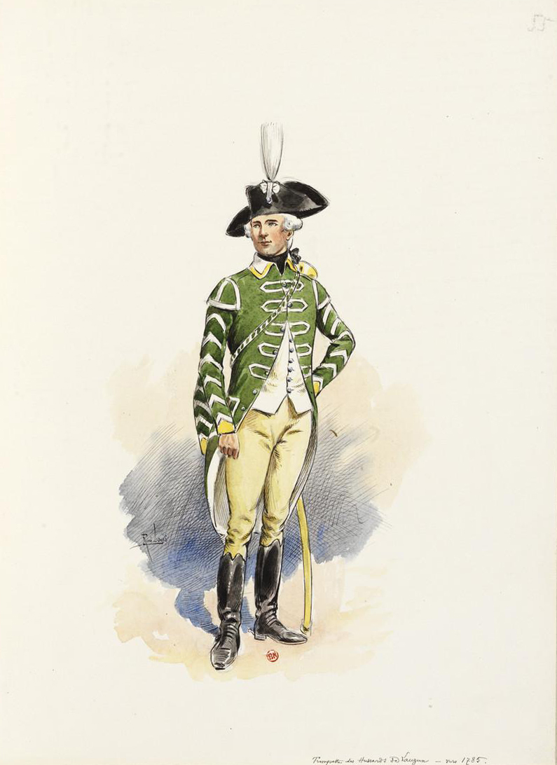 Trompette des Hussards de Lauzun vers 1785.